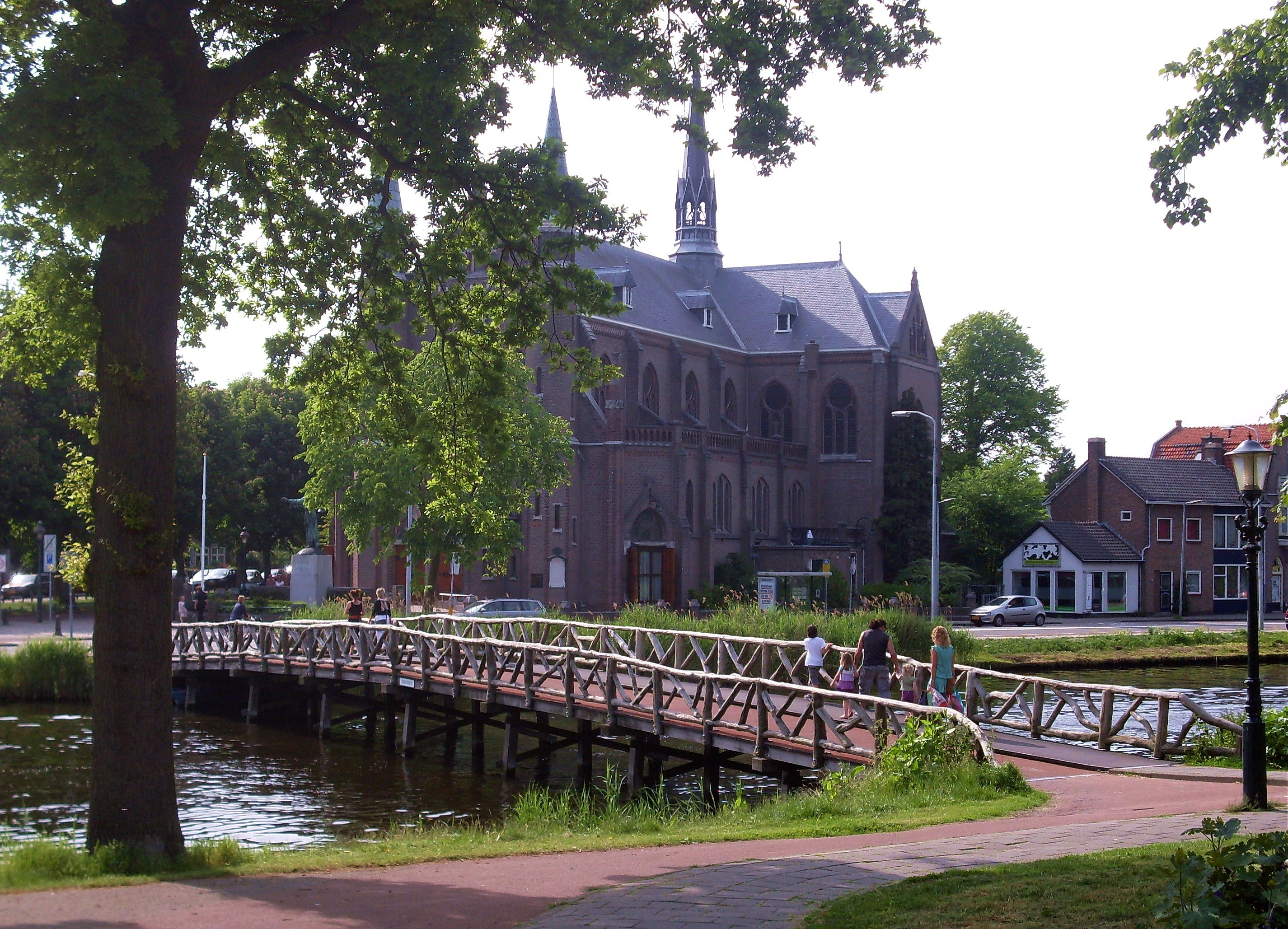 Kerk net buiten de binnenstad van Alkmaar